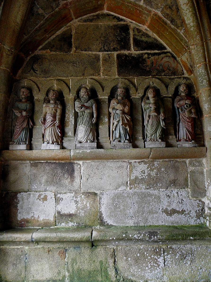 Porche sud de l'église Notre-Dame-de-la-Merci de Trémel (22). Costale ouest. Apôtres.